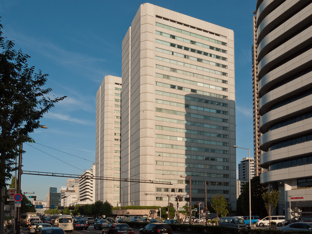 青山ツイン（新青山ビル）、東京都港区南青山1丁目。